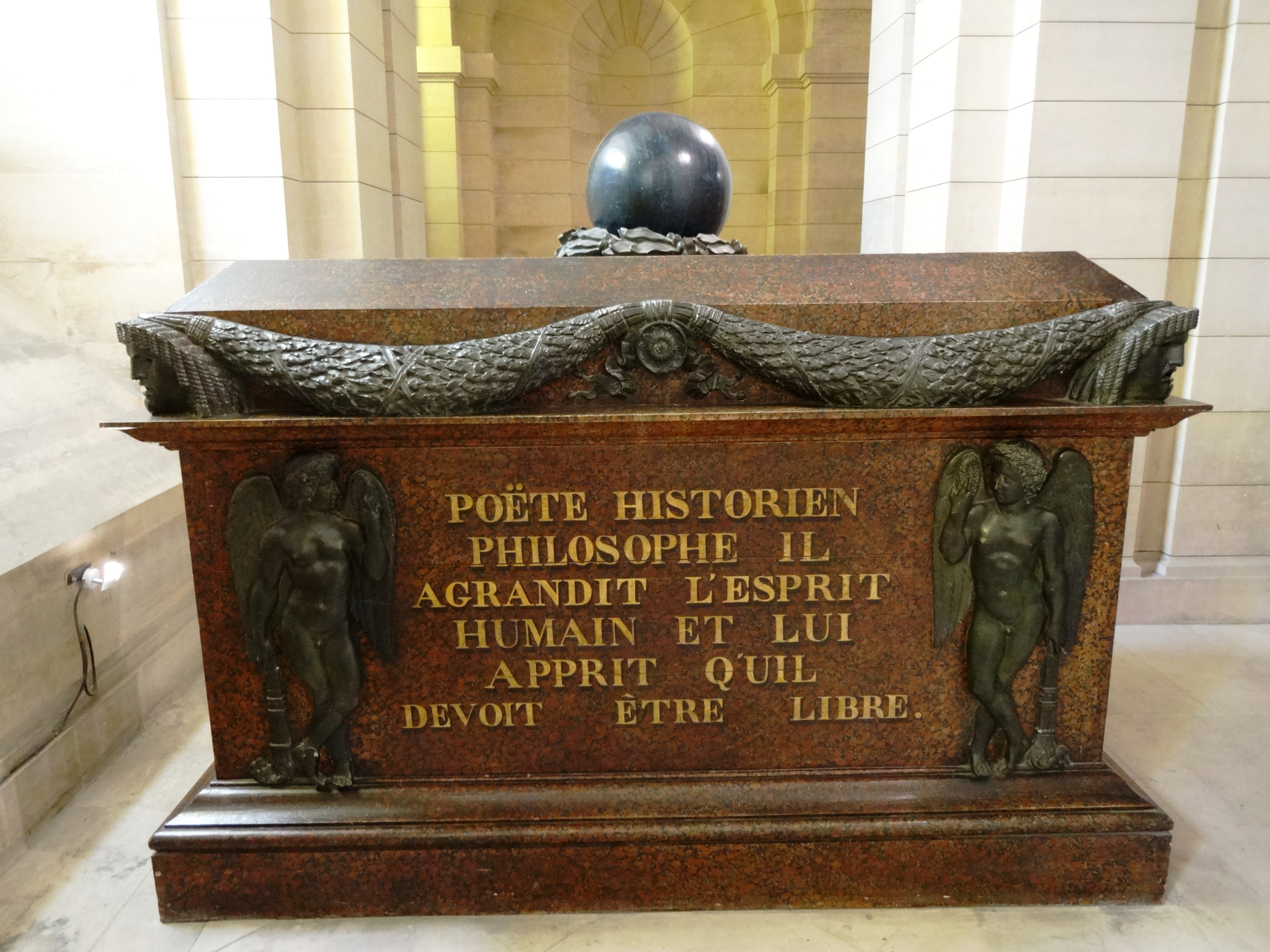 Sarkophag Voltaires im Pantheon, Paris